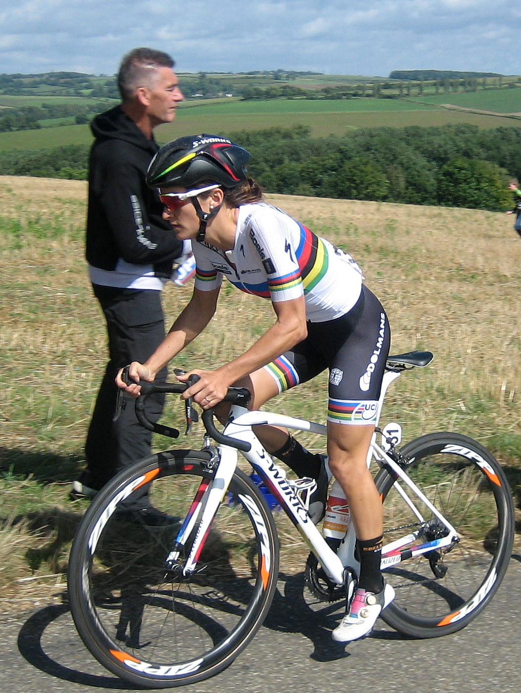 Kopgroep in de 6e etappe van de Boels Ladies Tour 2016 op de Gulpenerberg in Limburg.